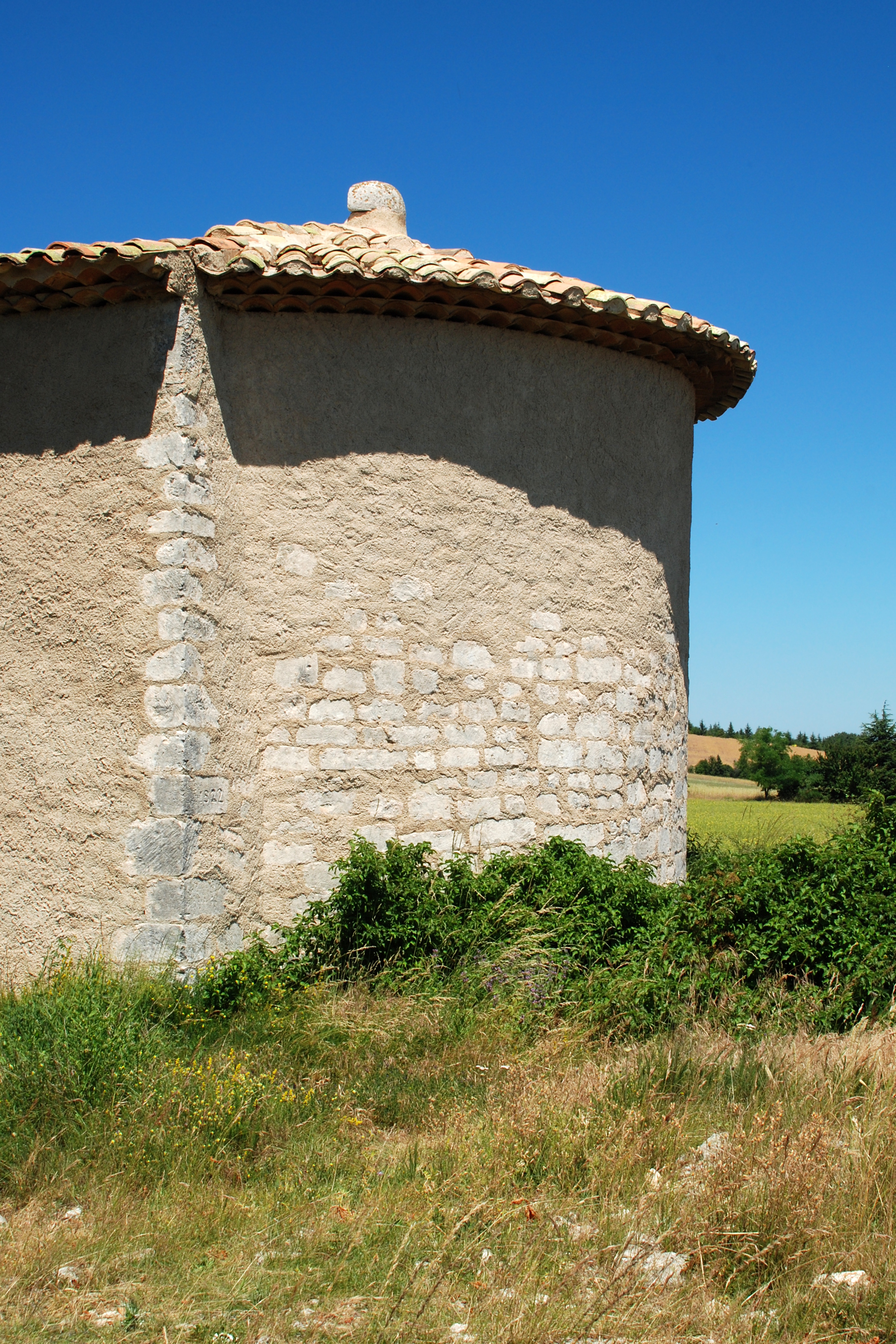 France - Provence - Vaucluse - Lagarde-d'Apt - Chapelle Notre-Dame de Lamaron